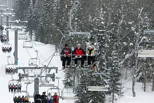 СОЧИ, КРАСНАЯ ПОЛЯНА. На горнолыжном курорте ОАО Газпром.